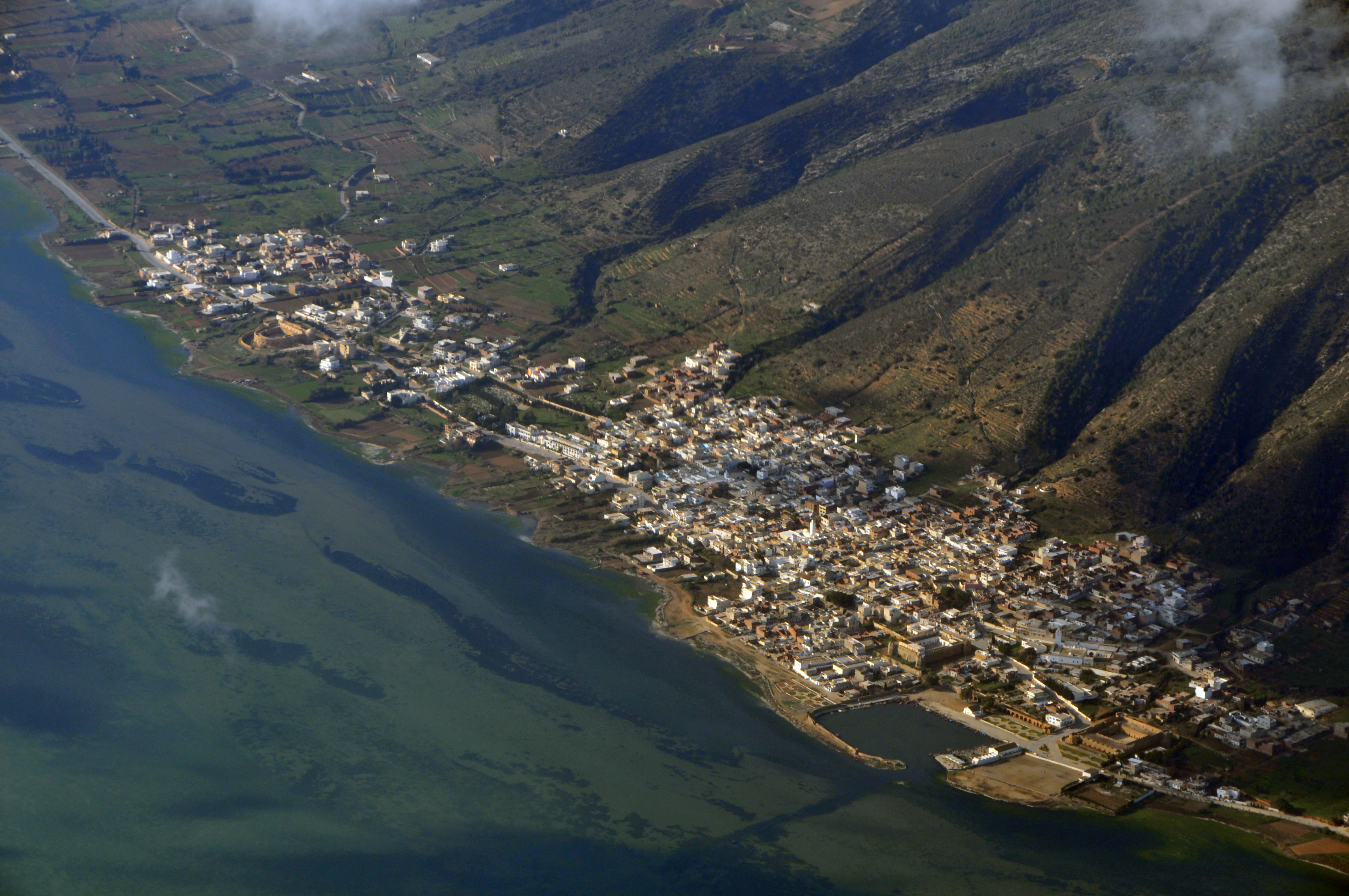 Vue aérienne de Ghar El melh, nord de la Tunisie